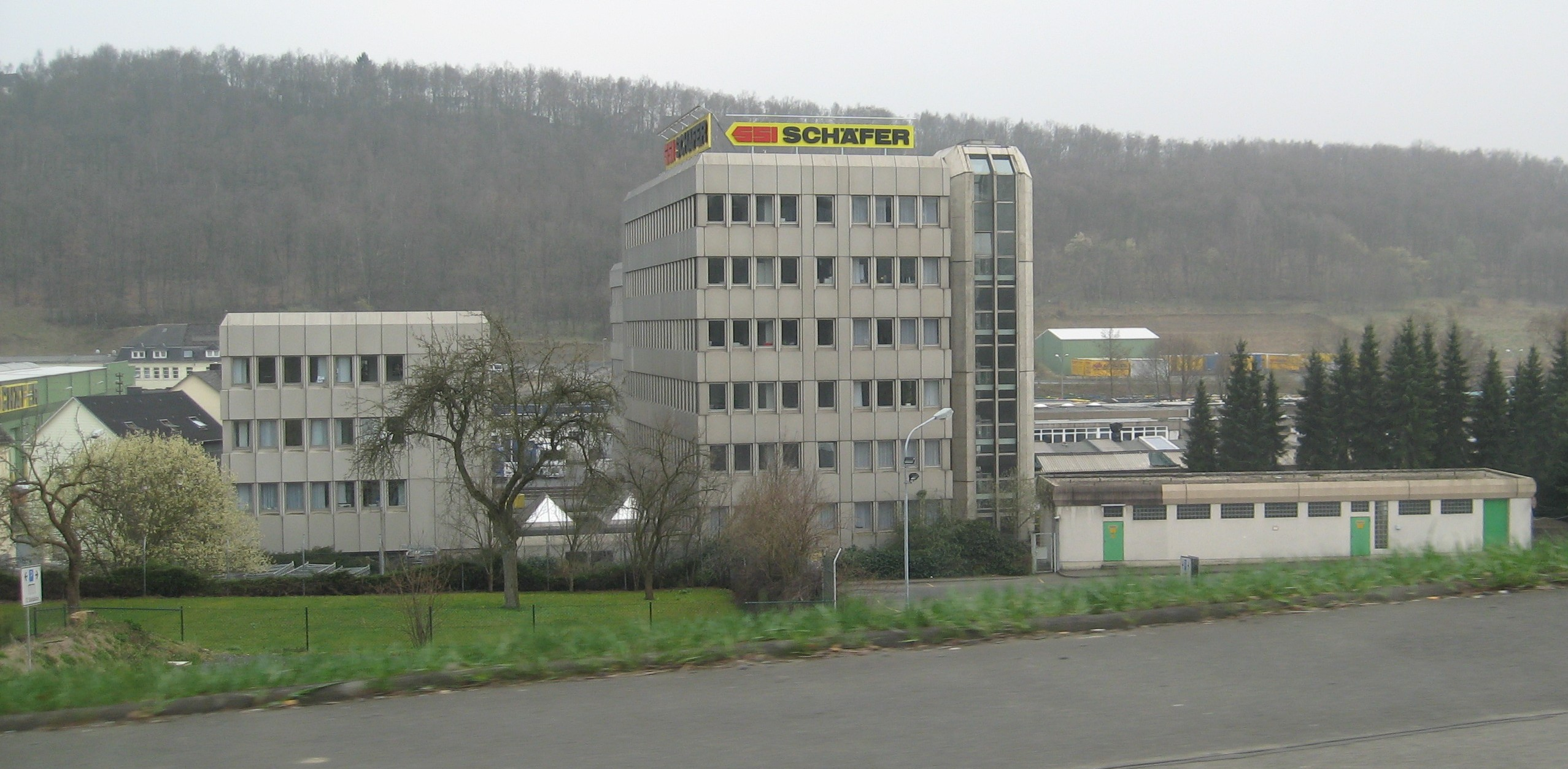 Hauptverwaltung von SSI Schäfer in Salchendorf (Neunkirchen/Siegerland).